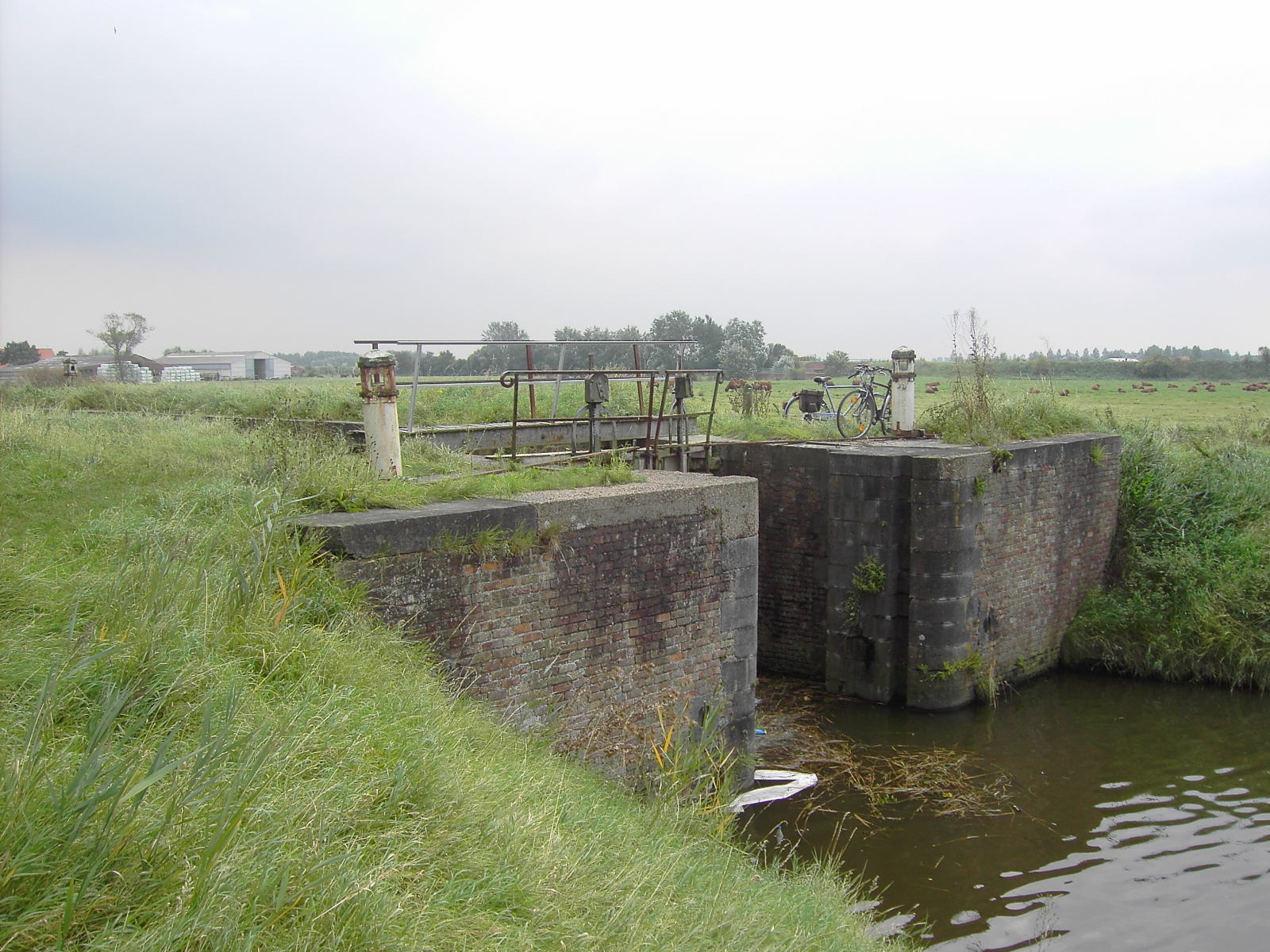 De monding van het sas in de Veurnevaart; in de wand van de sluis een sponning voor schotbalken; twee kaapstanders om de sasdeuren te openen en te sluiten